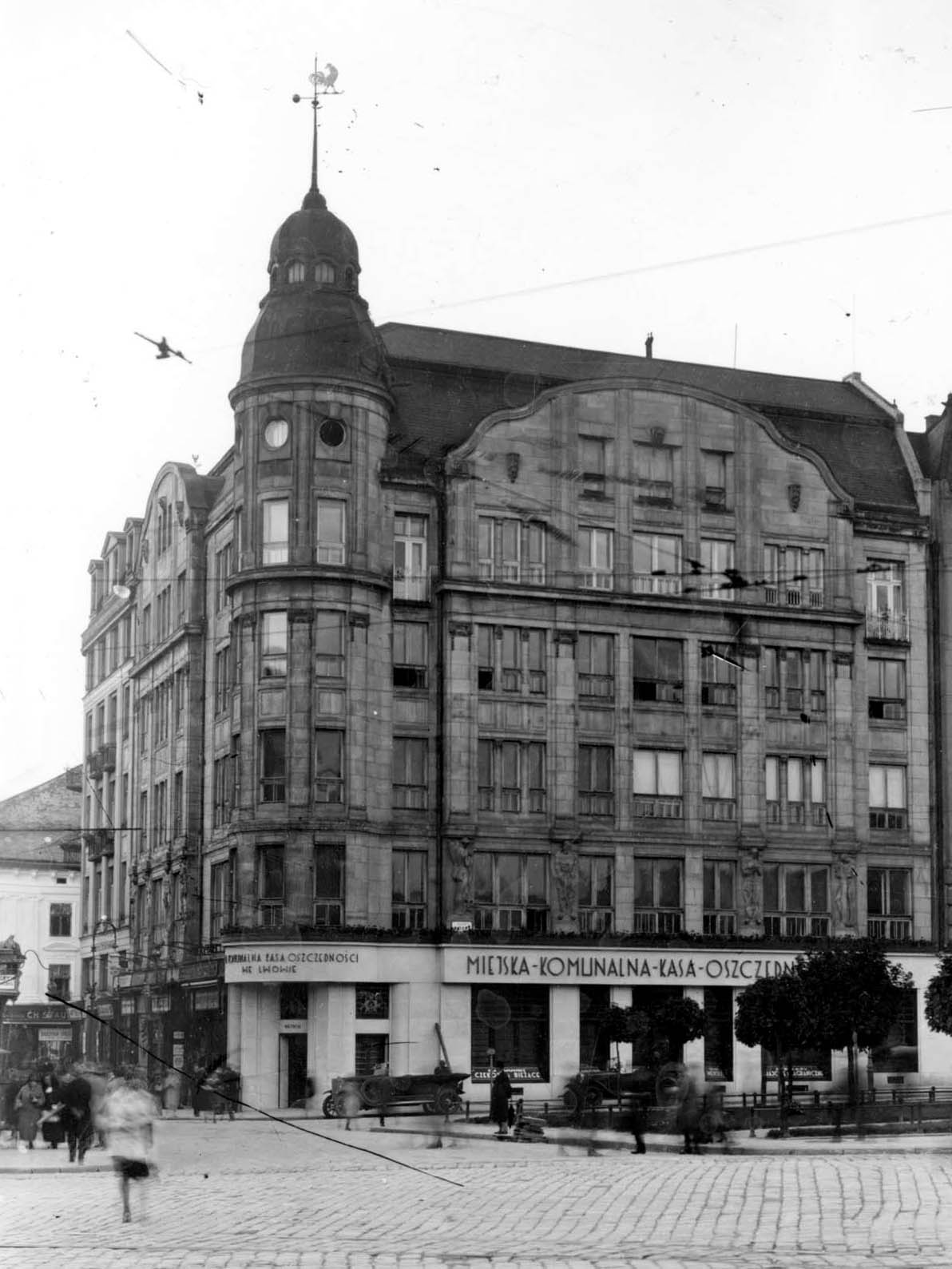 Новий будинок Теодора Балабана на розі вулиці Галицької (№ 21) і площі Галицької (одночасно вулиці Валової (№ 7))